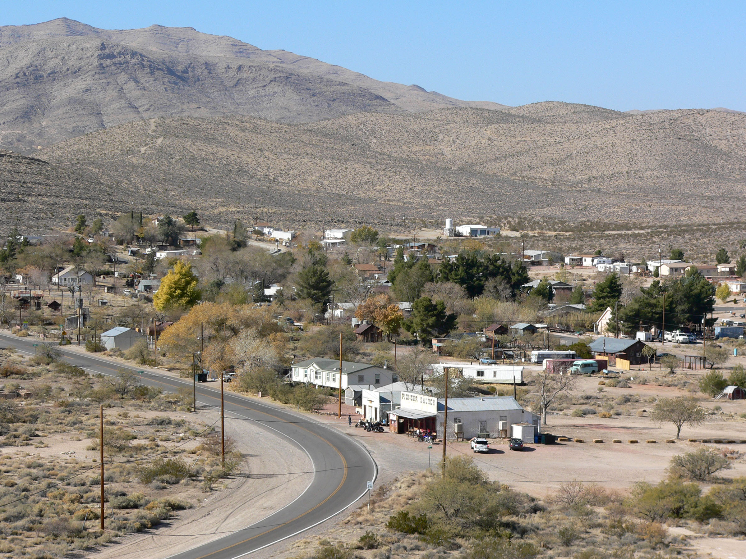 View of Goodsprings, Nevada